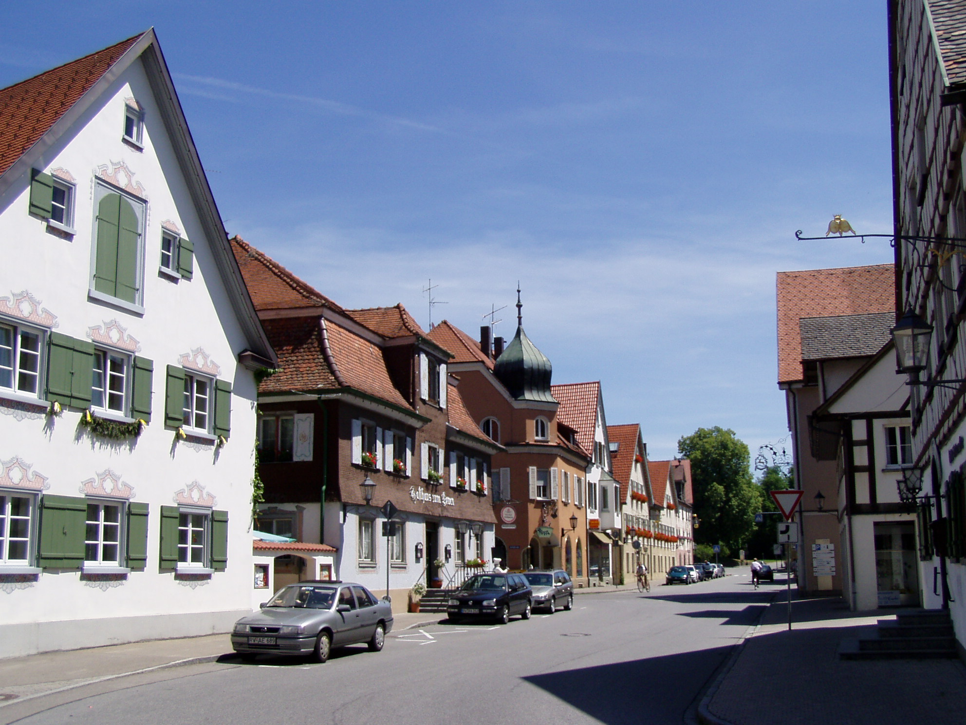 Herrenstraße in Kißlegg